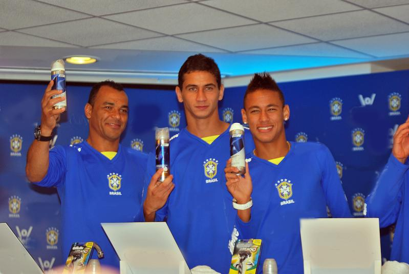 Os jogadores Cafú, Ganso e Neymar em 2010.